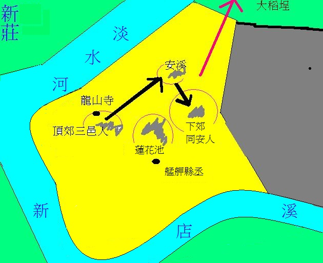 頂下郊拼示意圖